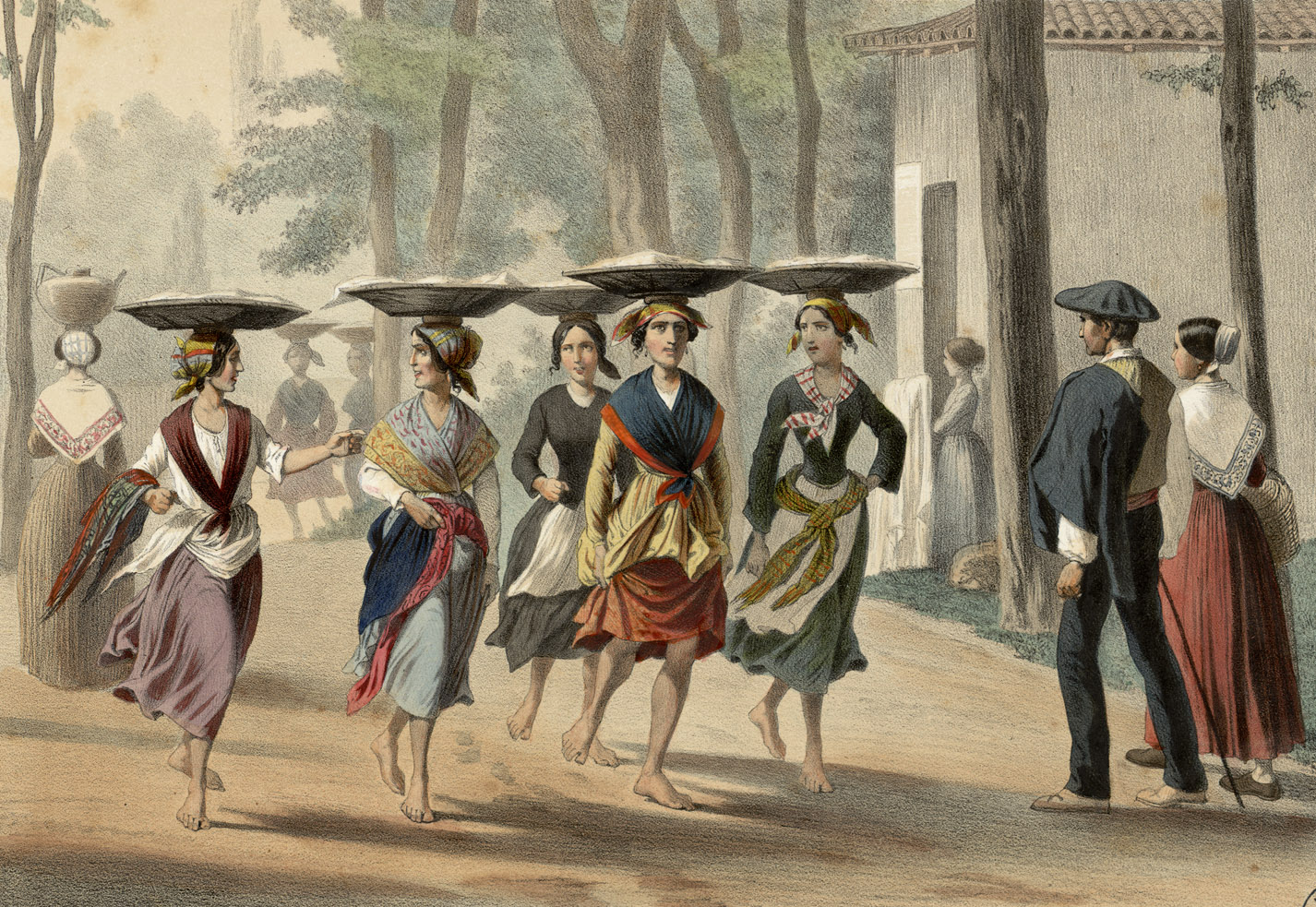 Titre calligraphié et illustré à l'encre sur feuille de calque Fait partie de deux albums réunis et publiés par F. Sinnett à Paris. Lith. de Becquet frères à Paris. Les planches du premier album ont été dessinées par Montaut et lithographiées par Bargue. Les planches du second album ont été dessinées et lithographiées par Charles Maurice. Le titre du premier album est lithographié. Le premier album est signalé dans la bibliographie pyrénéiste de Jacques Labarère comme étant très rare. Pièce jointe : photocopie en n. et b. d'une lithographie de Montaut intitulée "[Col de Tortes - Traversée de la montagne]". Ancely, René (1876 - 1966). Possesseur